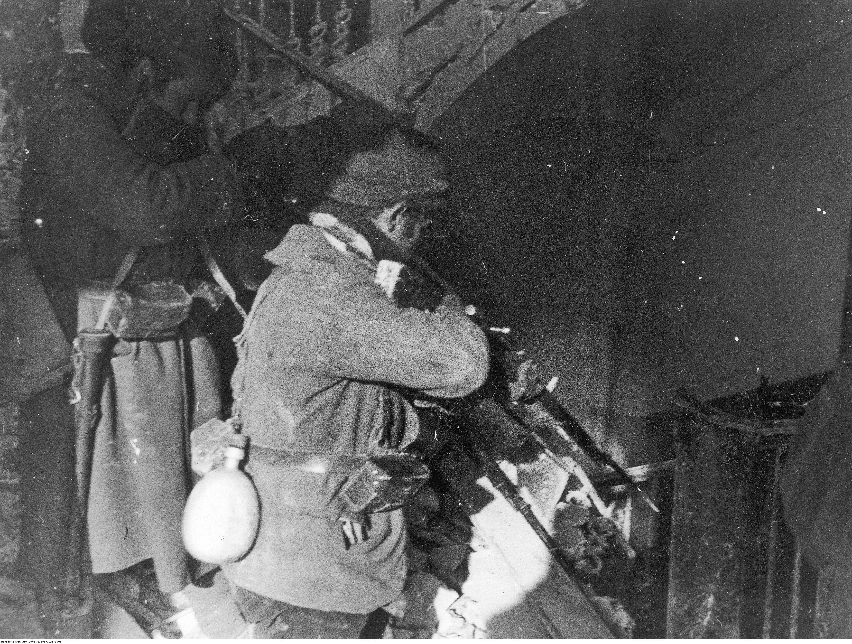 Soldados republicanos en los combates casa por casa que se desarrollaron durante la Batalla de Teruel.